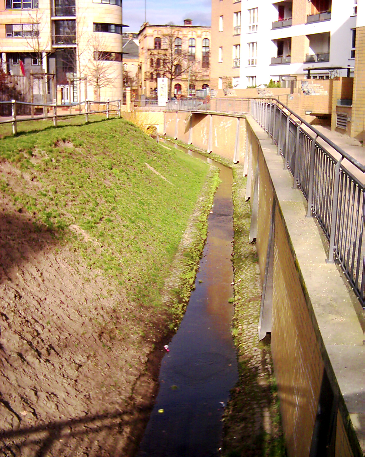 Die Panke bevor sie auf das Gelände der Charité gelangt, Ecke Phillippistraße, Rückseite des Charite-Hochhauses (Blickrichtung stromauf, Hessische Straße).